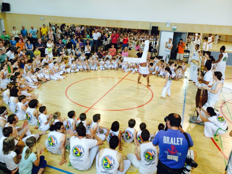 igra v rodi pri podelitvi pasov